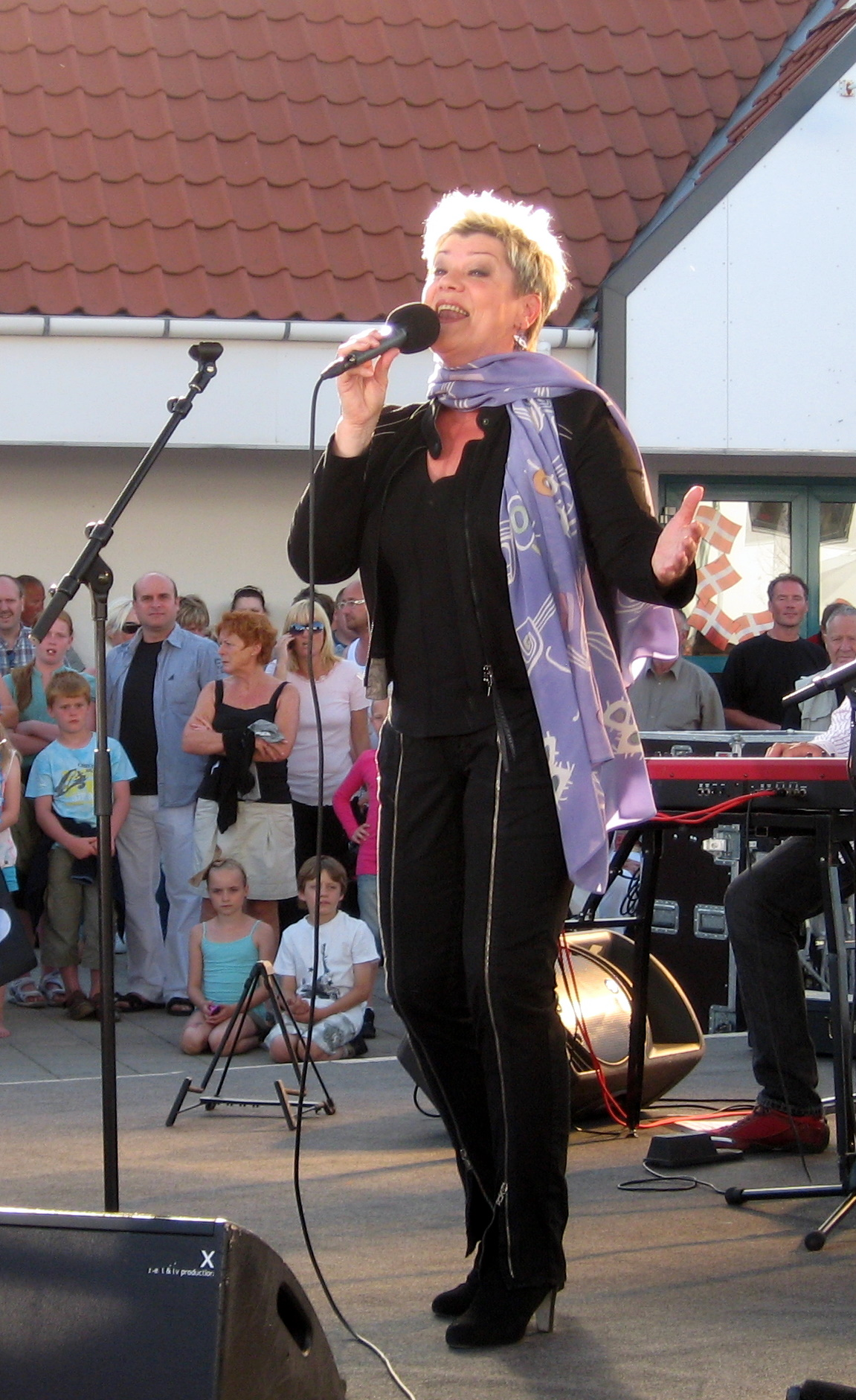 Ann-Mette Elten i Blokhus, 2011